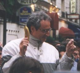 Daniel Prévost photographié en juin 1999 devant les locaux de la chaine Comédie lors de la dernière de "La Grosse Emission". Photo sous GFDL prise par Utilisateur:Jgremillot.